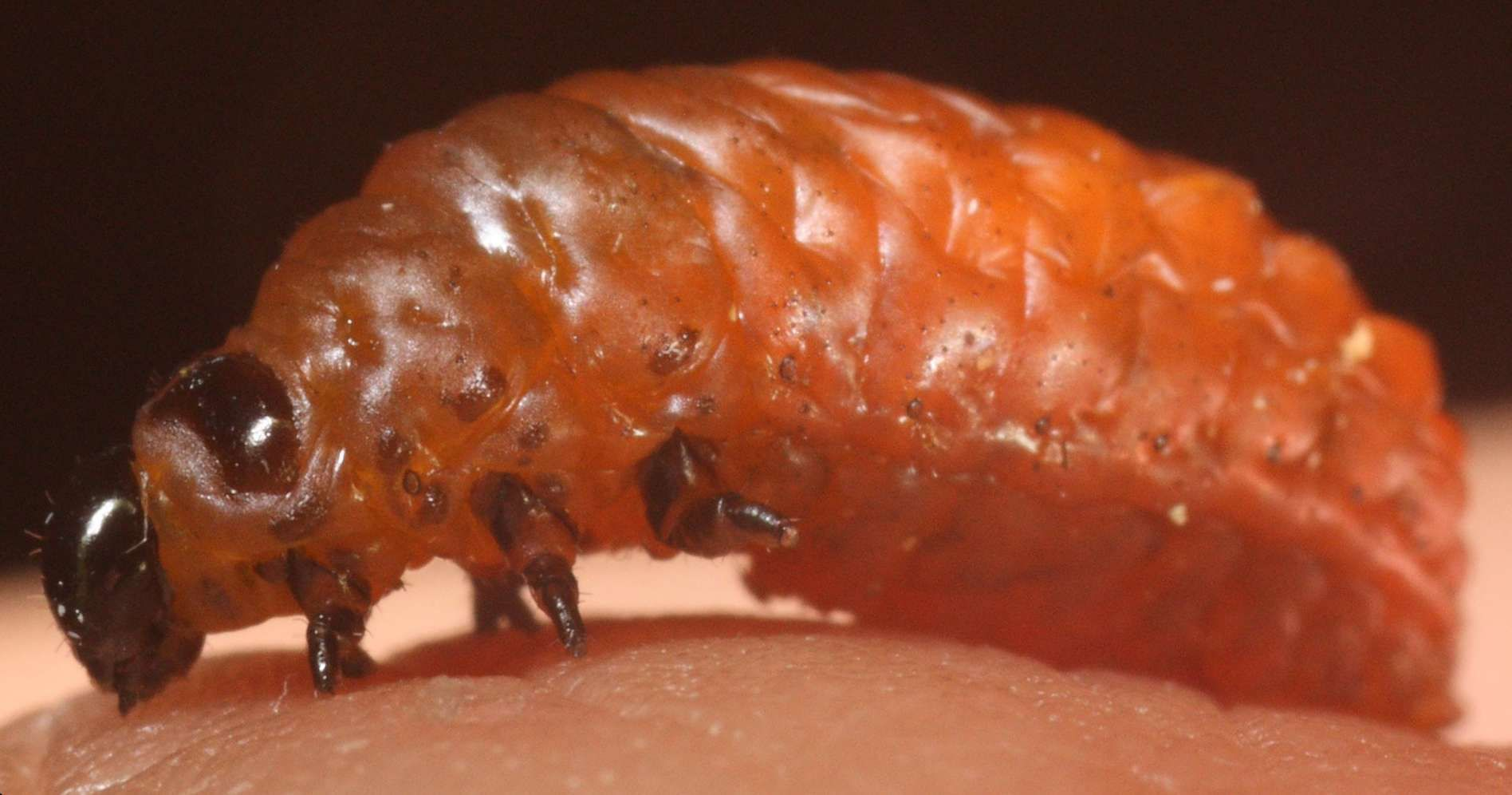 Larven av liljebille Lilioceris lilii.Template:Byline